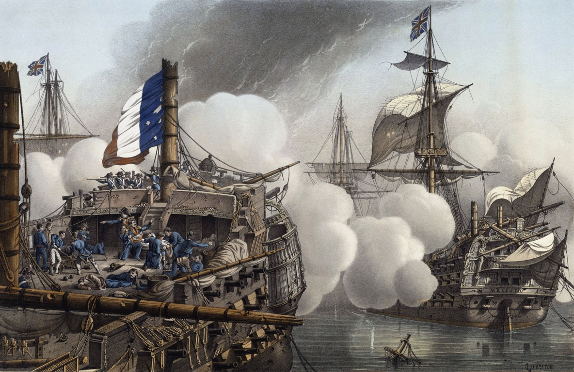 Les Vaisseaux Célèbres. Le Tonnant, au Combat D' Aboukir, (le 1er Août 1798)